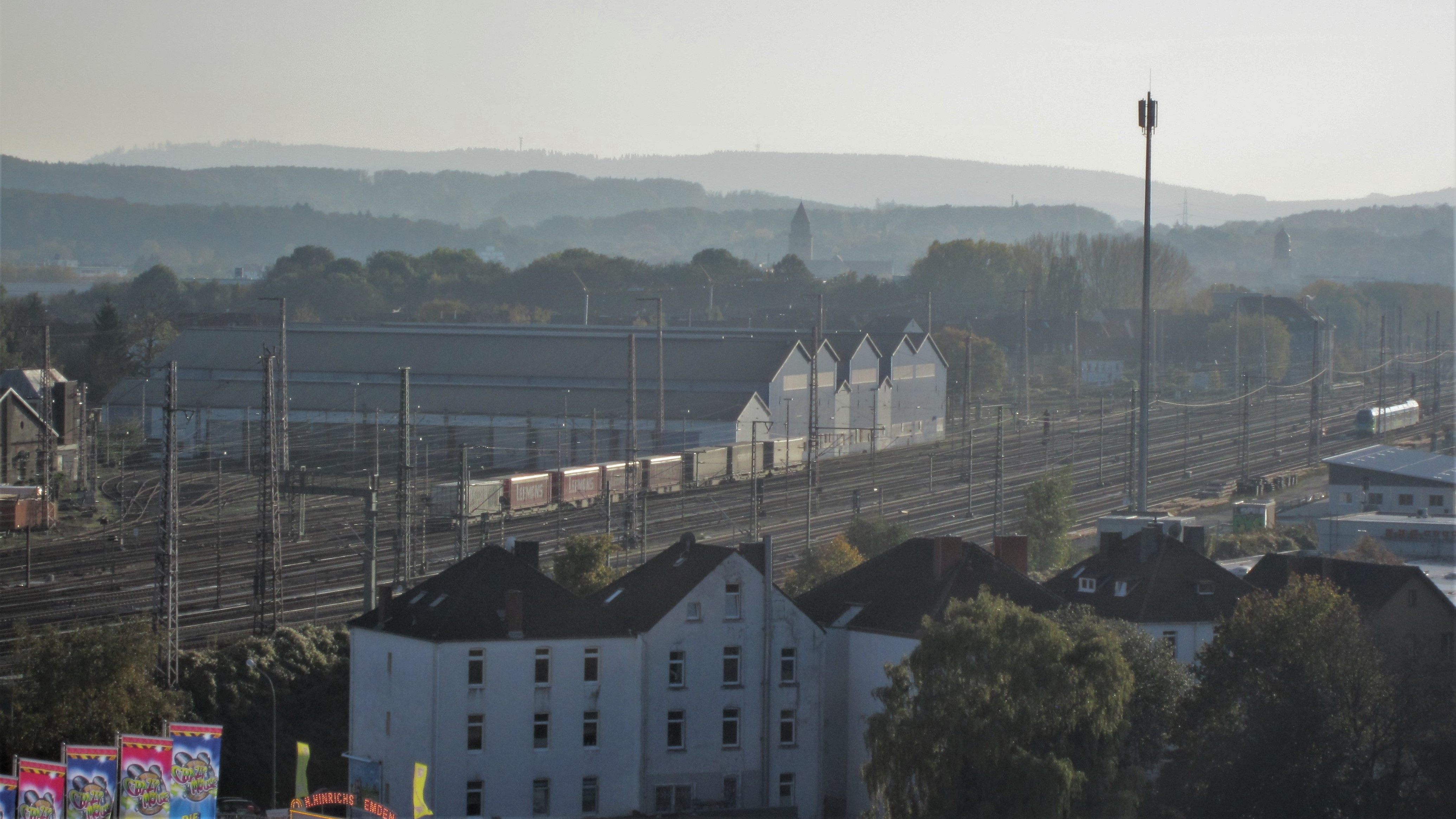 Blick vom Riesenrad auf dem Osnabrücker Herbstjahrmarkt und die Eisenbahnlinie Wanne-Eickel-Hamburg in Richtung Teutoburger Wald